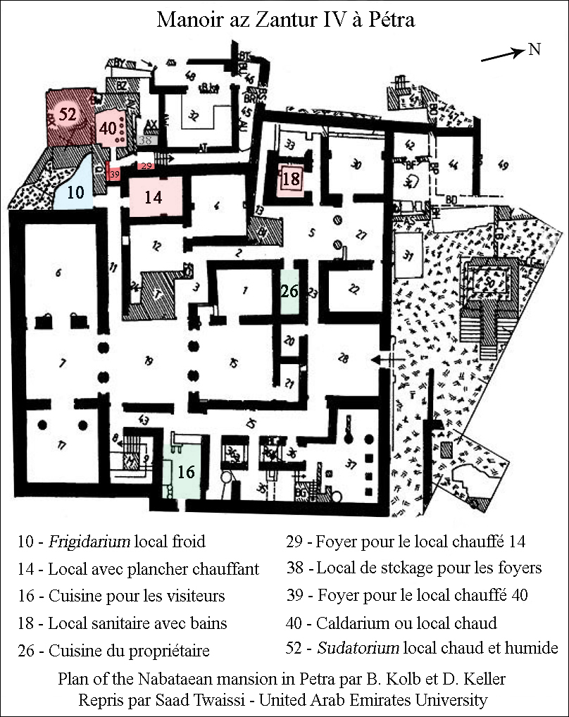 Résidence ez Zantur IV. Plan des locaux de la résidence, fouilles de 2001.